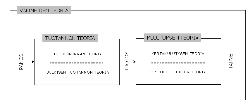 Tuotannon ja kulutuksen teorian sekä välineteorian viitekehys